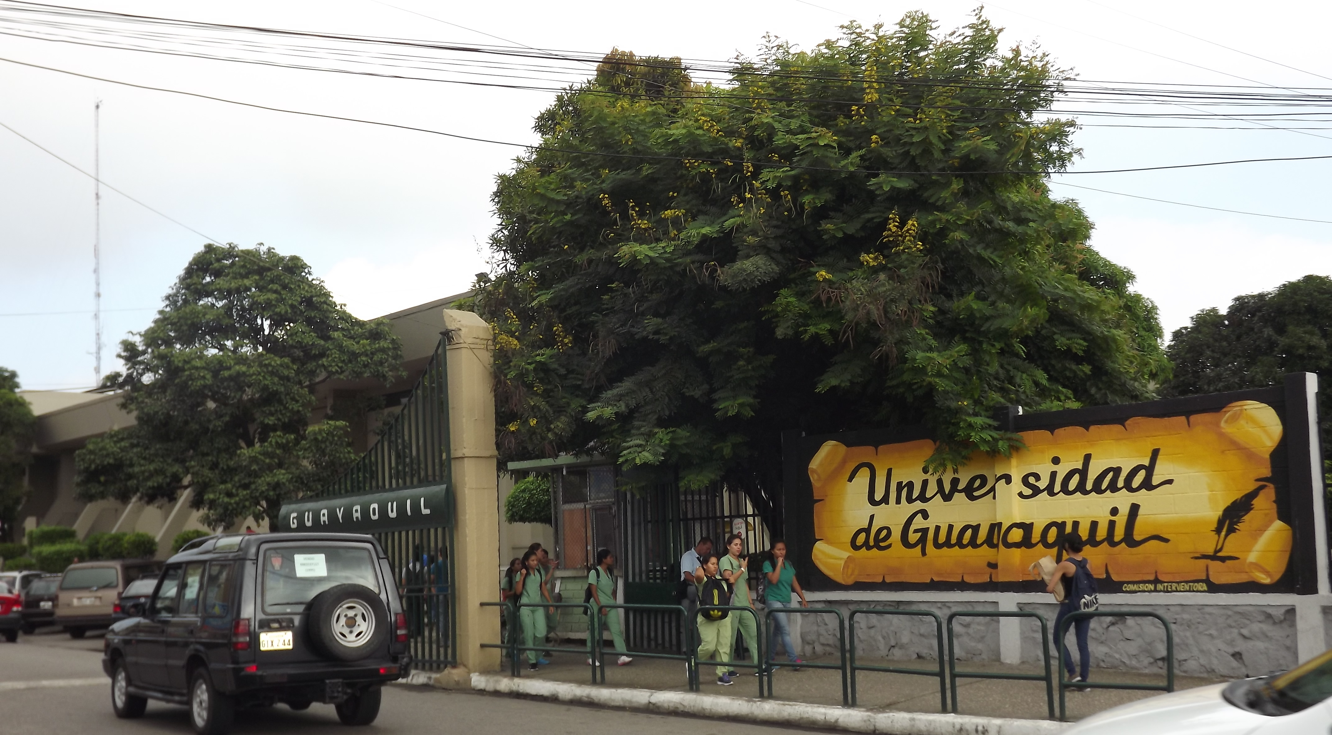 Entrada de la Universidad